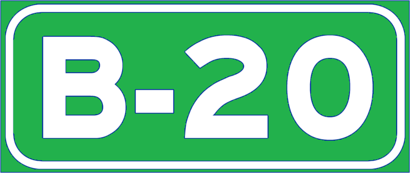 Identificador de la Autovía B-20